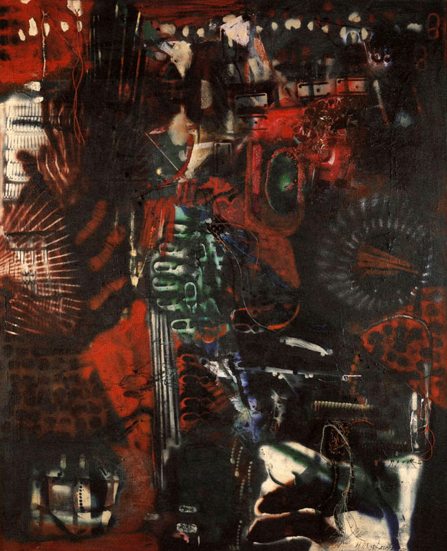 Foto des Gemäldes von Irma Hünerfauth: "Die rote Schmach" mischtechnik und Collage a/wd., 160x130 cm.